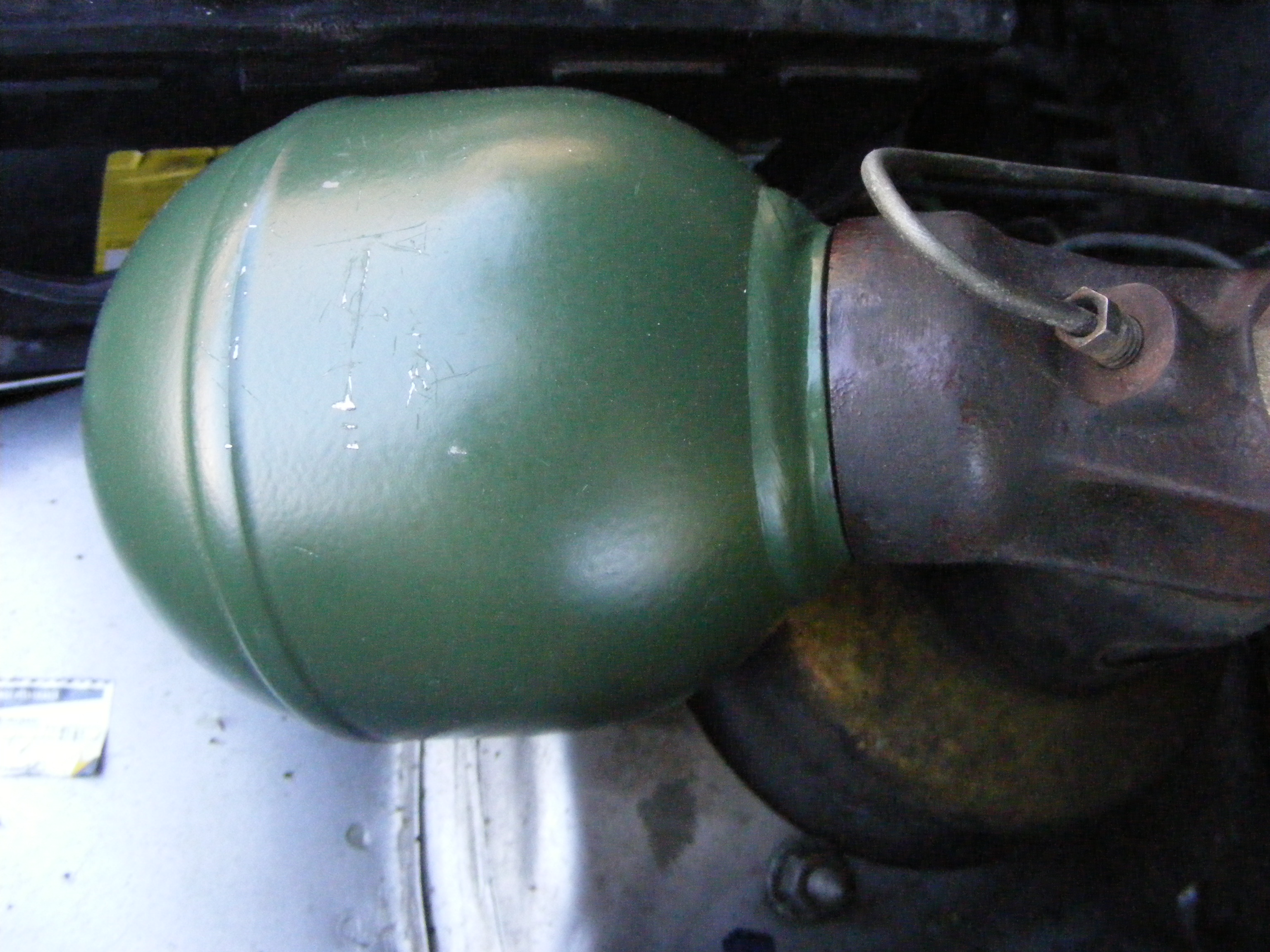 Sphère équipant les véhicules Citroen a suspension hydraulique.